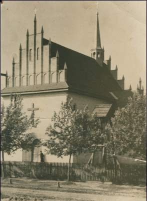 Касцёл у Мікашэвічах на даўнім фотаздымку (з фондаў лунінецкага краязнаўчага музэя) - да перабудовы пад царкву